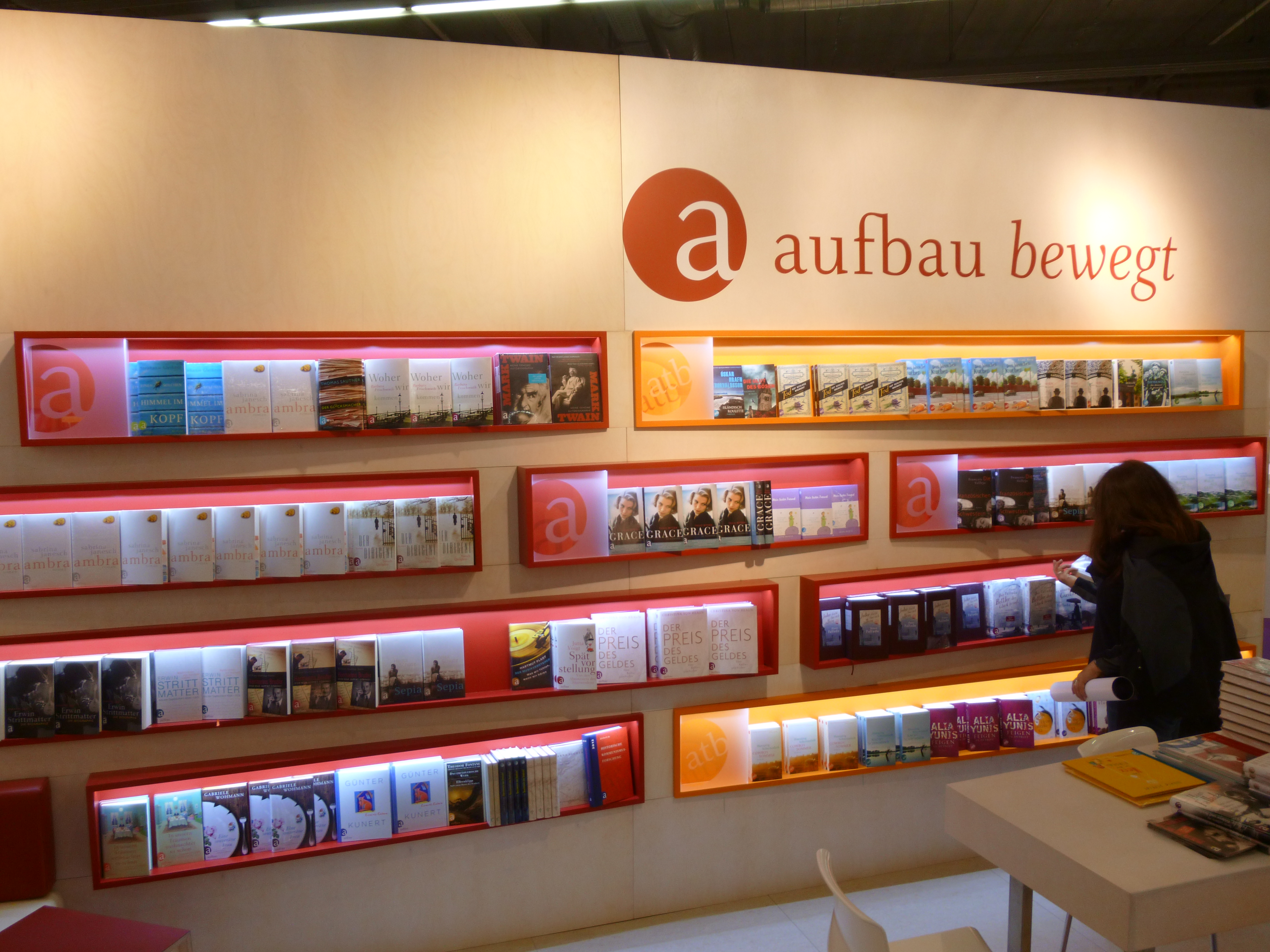 stando de la eldonejo Aufbau en la Frankfurta librofoiro 2012